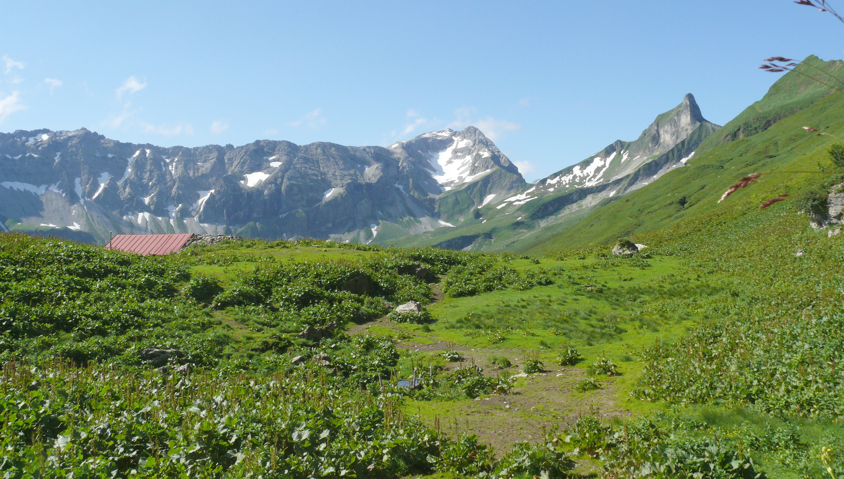 Pflanzengesellschaft Rumicetum alpini, Allgäuer Alpen, Deutschland im Hintergrund Großer Wilder und Schneck